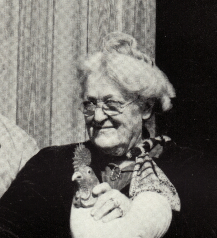 Ruth Randall Edström samt porslinstupp.